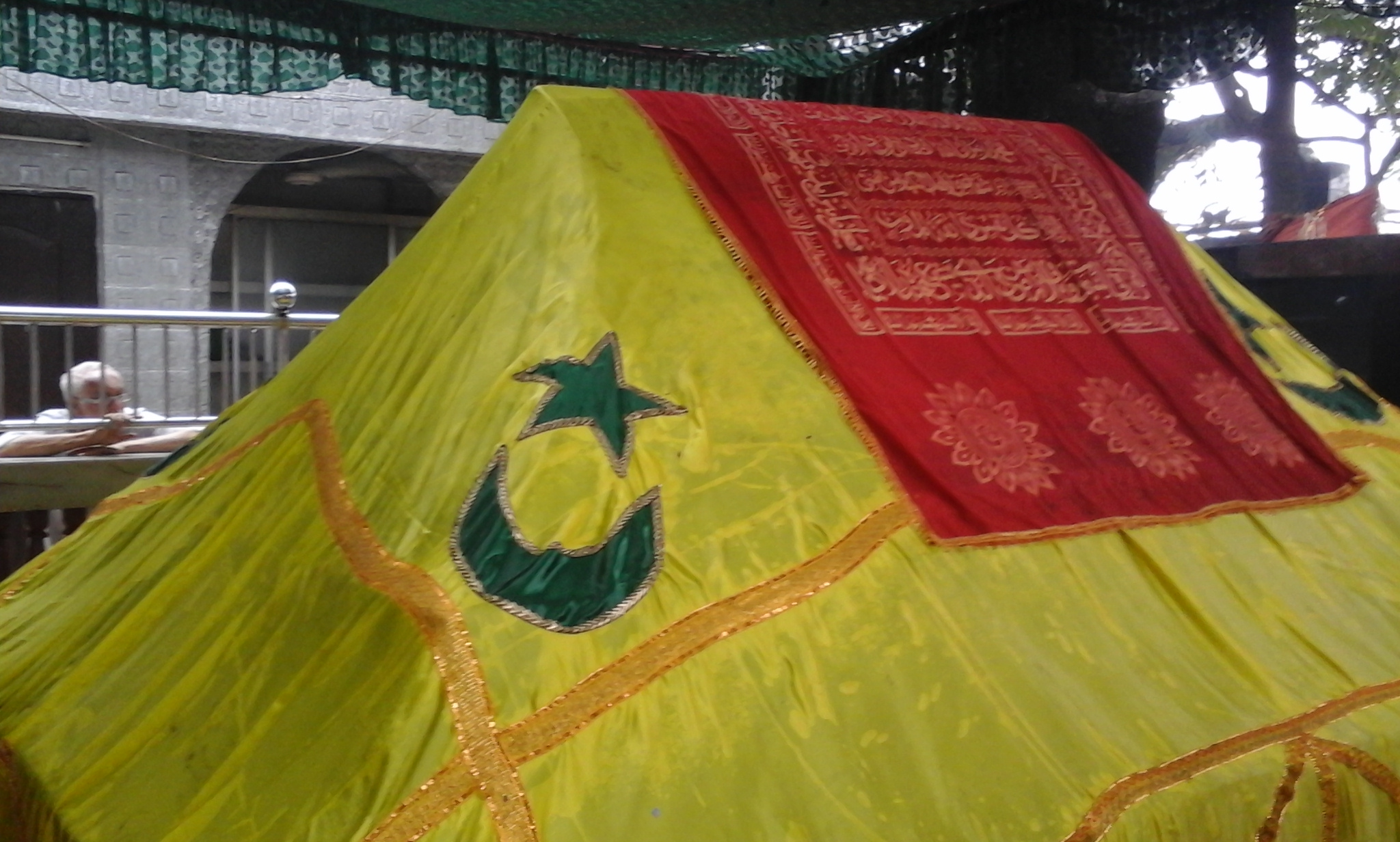 হযরত শাহ পরাণ এর মাজার, সিলেট। তিনি হলেন ১৪শ শতাব্দীর সিলেটের বিখ্যাত ইসলাম প্রচারক হয়রত শাহ জালাল এর অন্যতম সহকর্মী ছিলেন।